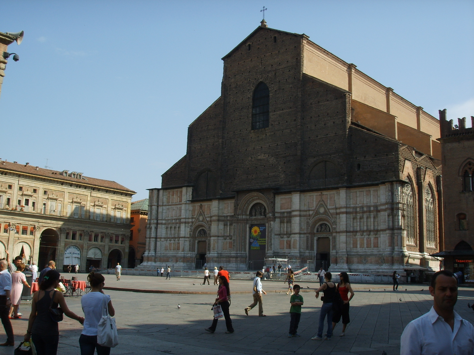 Facciata di San Petronio a Bologna.